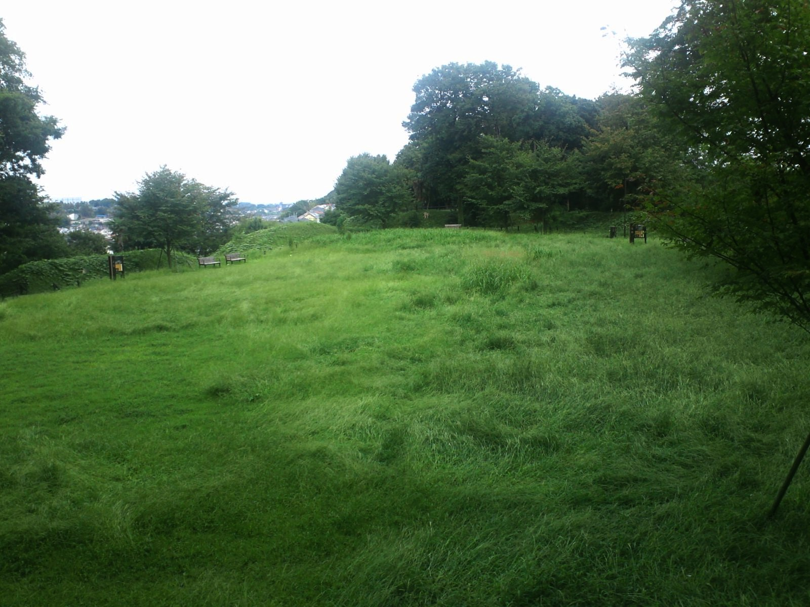 茅ヶ崎城跡（神奈川県横浜市）